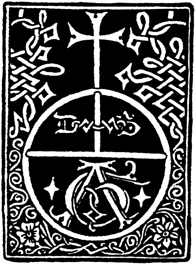 Marca del impresor Arnao Guillén de Brocar, usada por primera vez en Pamplona, en el libro "Reguale Grammaticales" de Esteban de Masparrauta, impreso en 1492. Se estructura en base a un rectángulo en negro en cuyo interior hay un círculo. Este está dividido por la mitad y en el interior se entrelazan sus dos iniciales A G. En la parte superior del círculo las iniciales DG se encadenan a un palo, mástil de una cruz. Alrededor decoración de arabescos, entrelazos y dos flores una de cuatro pétalos (izquierda) y otra de cinco (derecha).